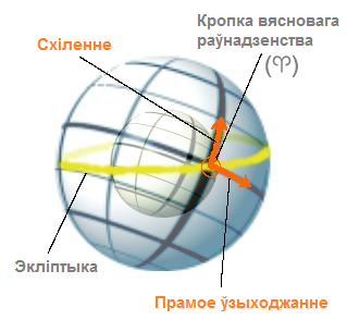 Схема адліку экватарыяльных каардынатаў